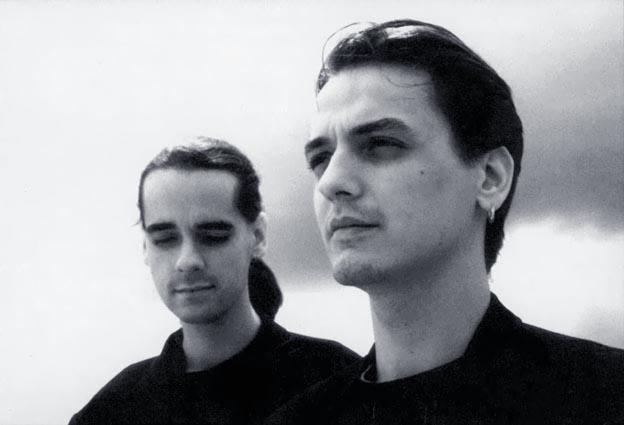 Die Band Wolfsheim im Jahre 1992 (links: Markus Reinhardt / rechts: Peter Heppner)